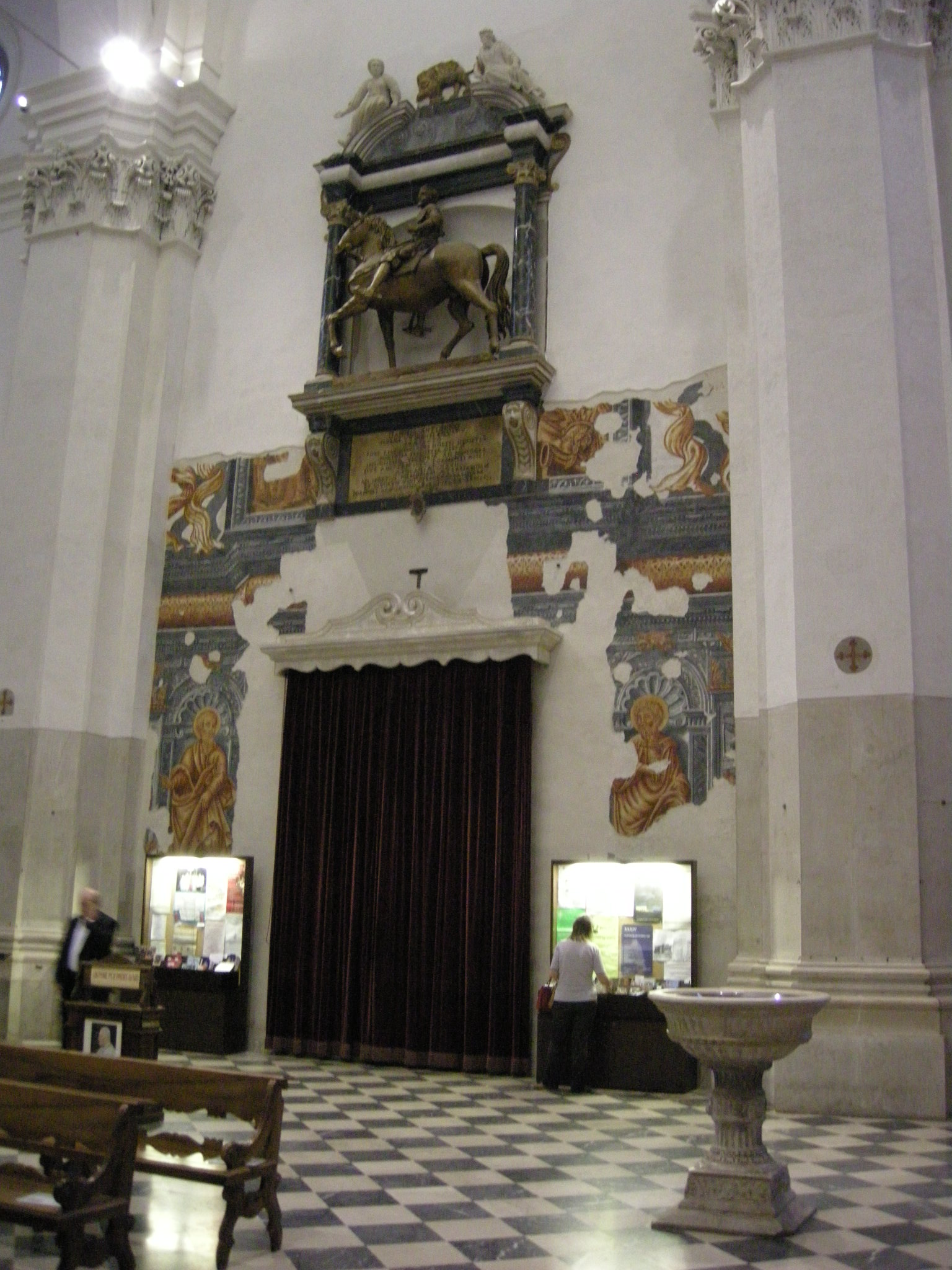 Duomo di udine, interno 05 controfacciata